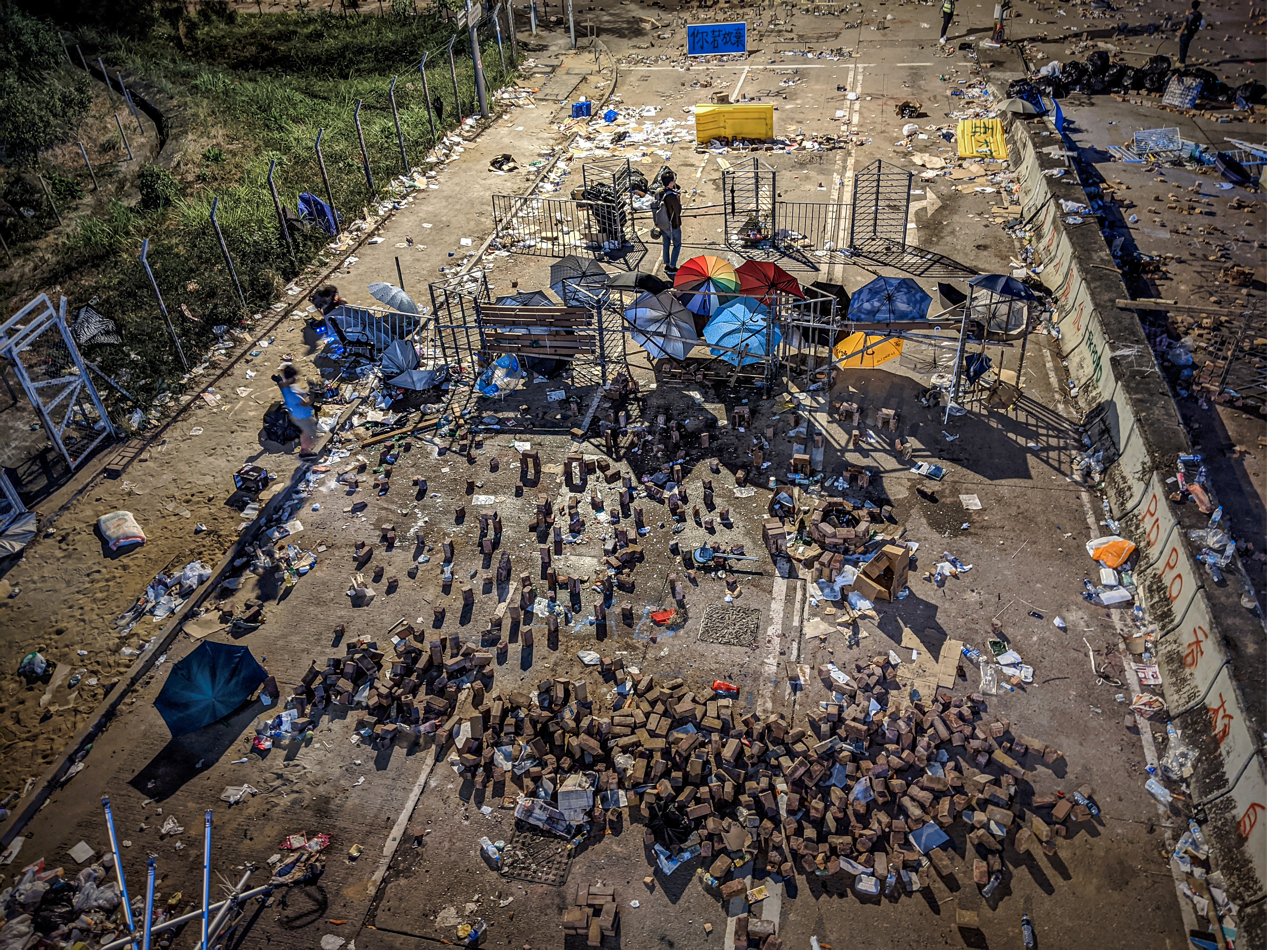 IMG_20191116_182943